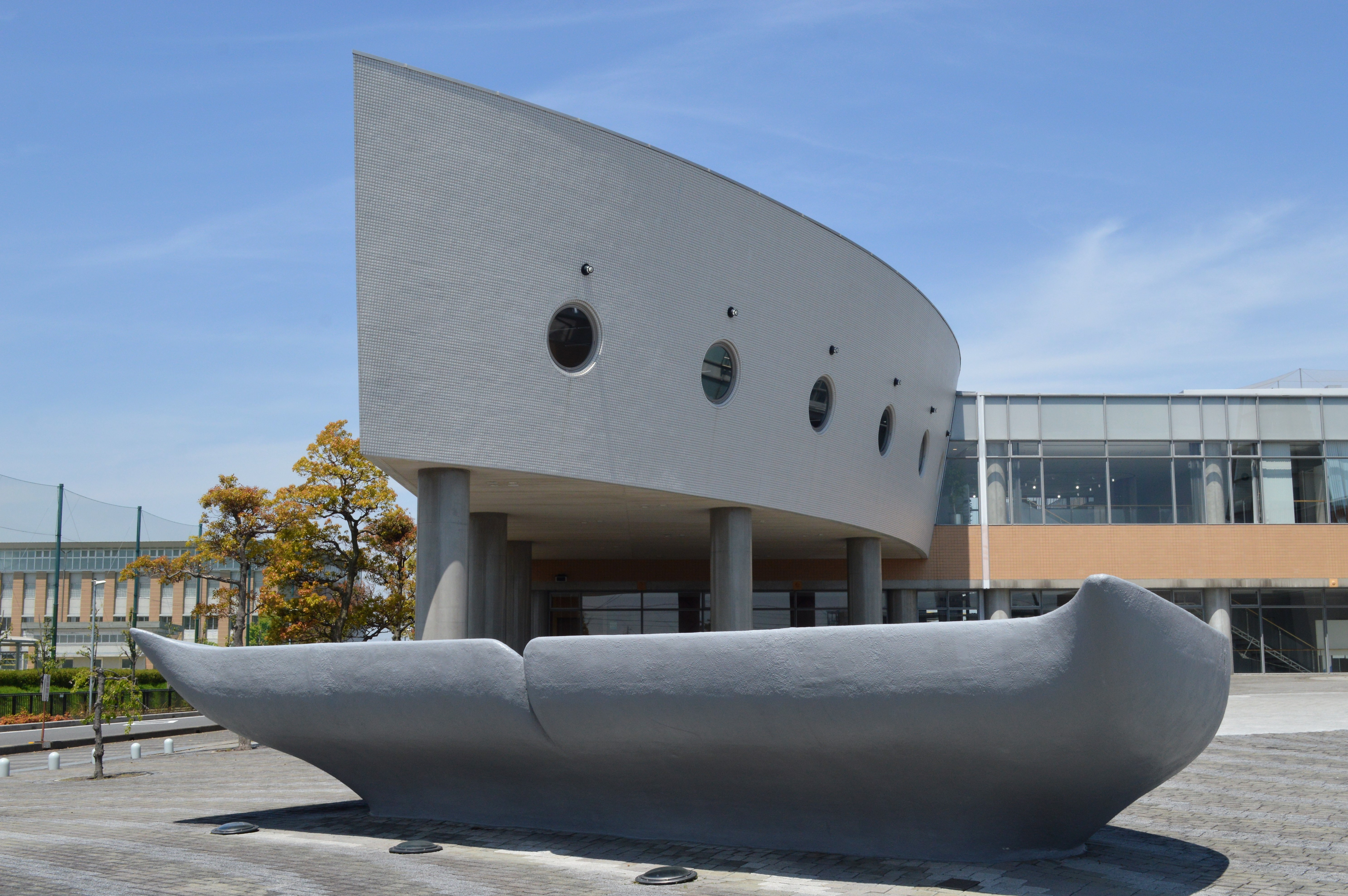 愛知県海部郡飛島村にある飛島村すこやかセンター。飛島村図書館などが入っている。